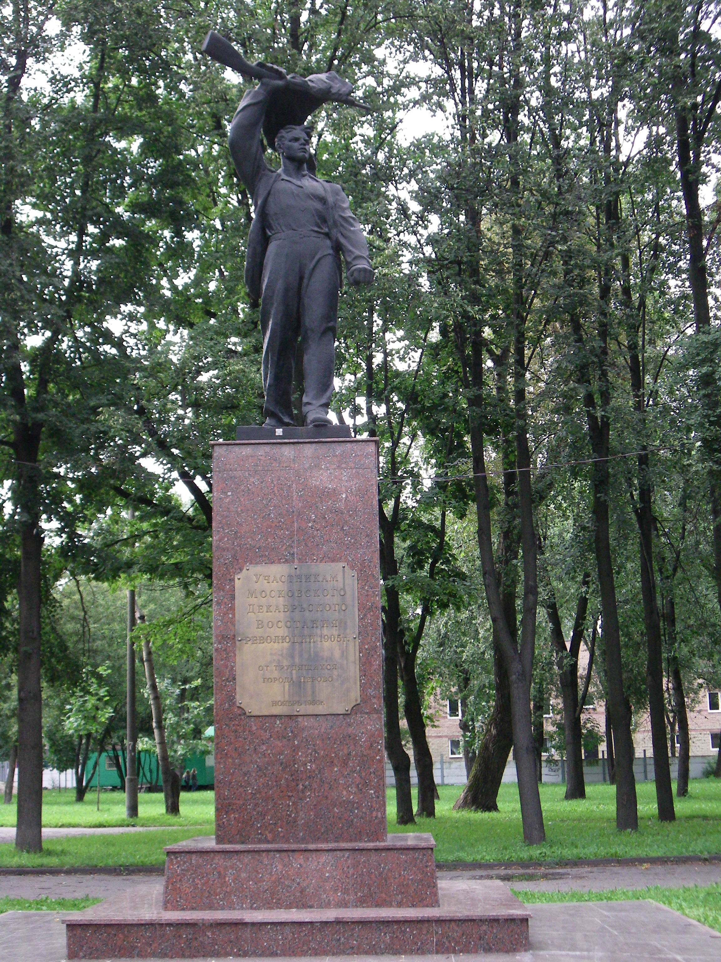 Monumento de partoprenantoj de la batalo en 1905 (parko "Perovskij").